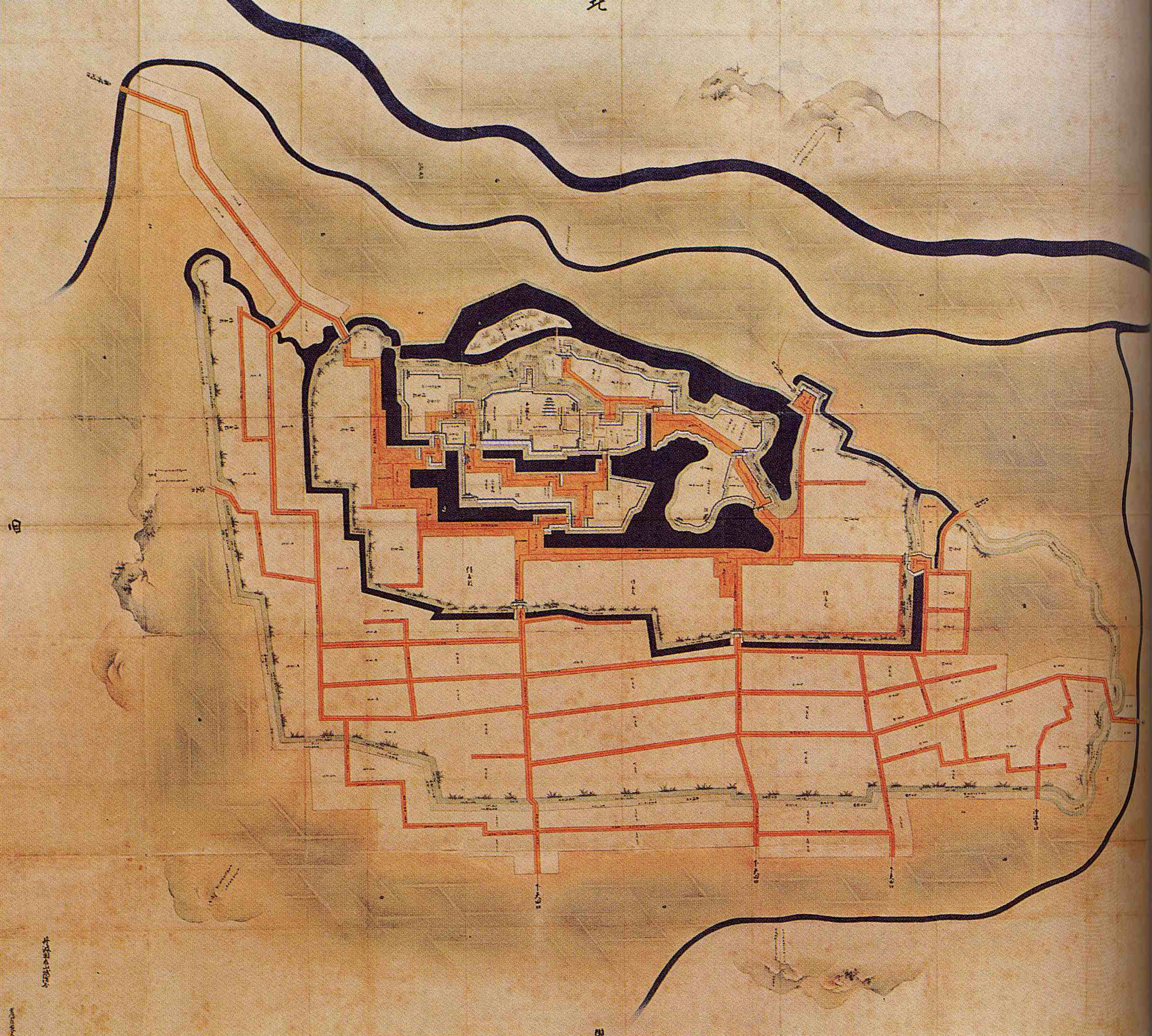 丹波国亀山城絵図